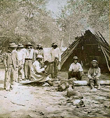 Albert Bierstadt desenhando entre índios em Steamboat Springs, Yellowstone